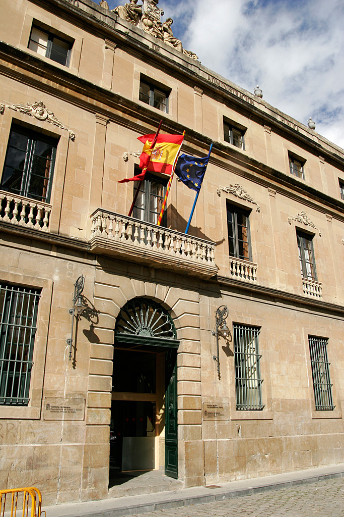 Un edificio construido entre los años 1861 y 1865, que se caracteriza por ser el más antiguo edificio de Pamplona dedicado de forma ininterrumpida a la actividad docente, primero como Instituto de Bachillerato y después como Escuela de Magisterio y de Comercio.